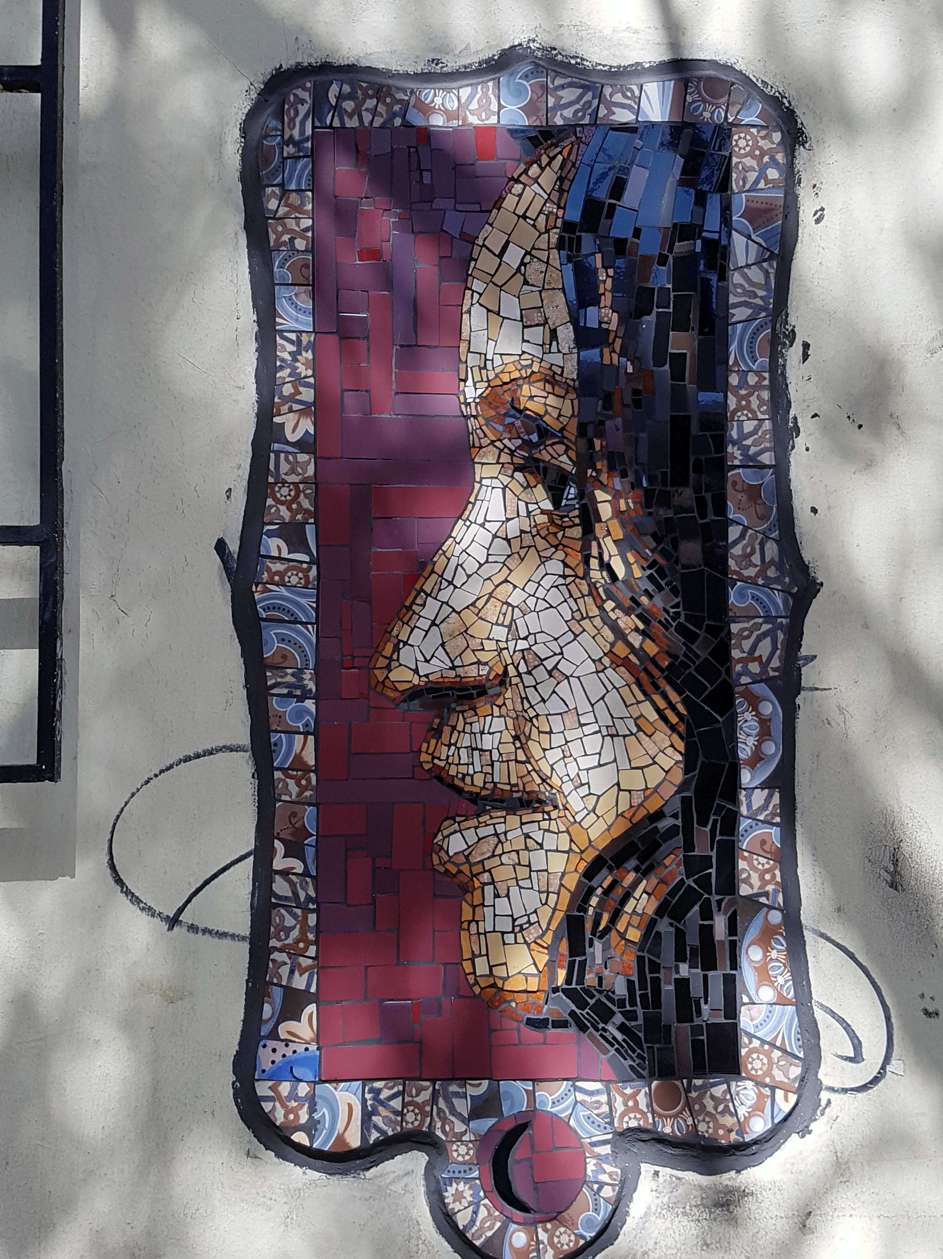 Retrato de Violeta Parra, mosaico en la calle Lastarria firmado por MUSA, dúo compuesto por Isabel González Zúñiga (quien además es fotógrafa y músico) y Gonzalo San Martín (dedicado asimismo a la música y artesano titiritero); barrio Lastarria, Santiago de Chile.